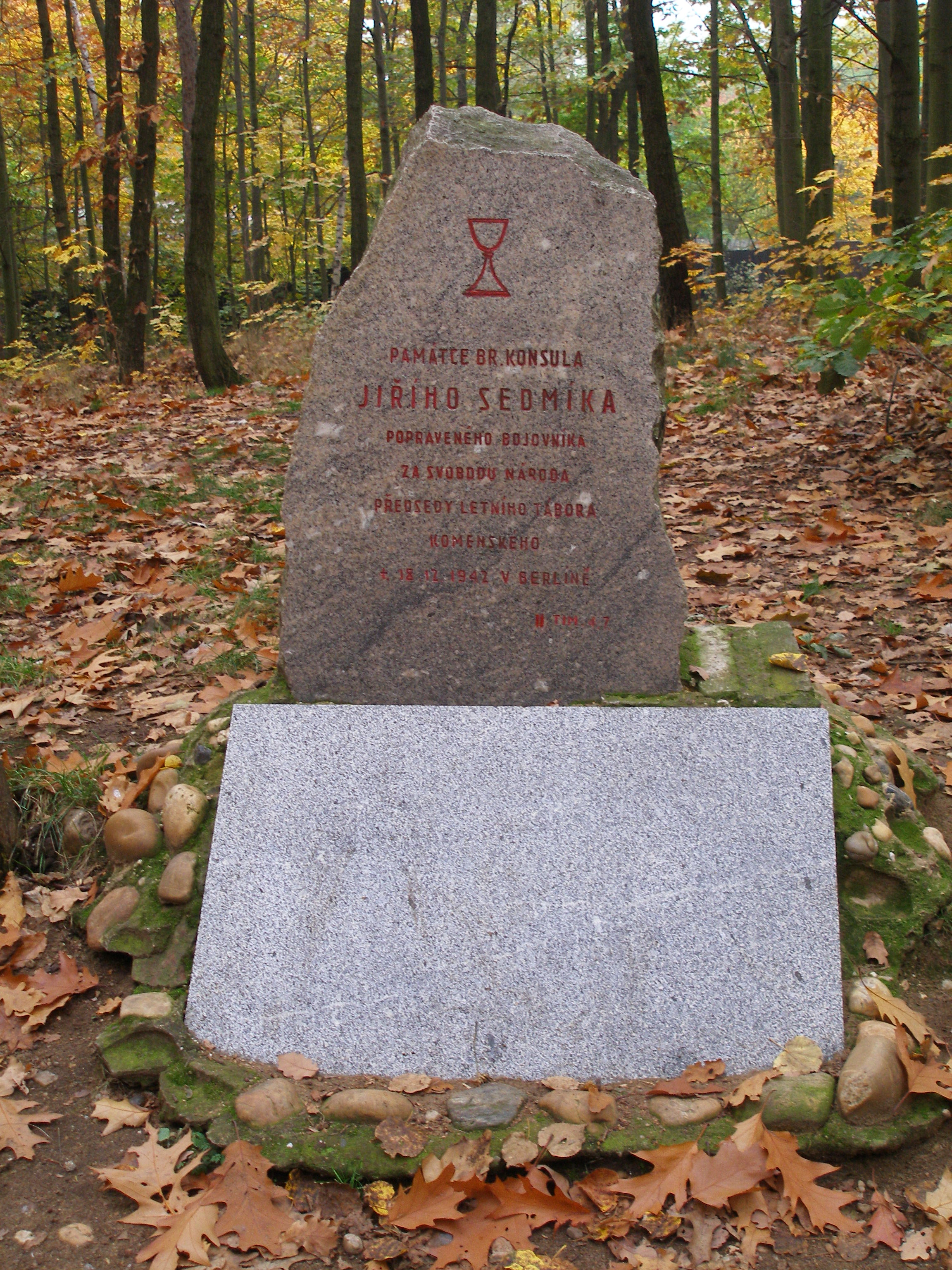 Pomník Jiřího Sedmíka v pražské Troji.